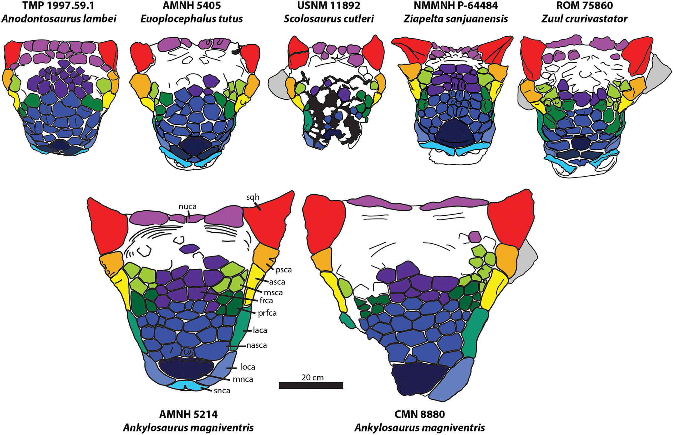 Skulls of Ankylosaurus compared with the ankylosaurins Anodontosaurus, Euoplocephalus, Scolosaurus, Ziapelta, and Zuul, in dorsal view, with cranial ornamentation colour coded for comparative purposes. asca, anterior supraorbital caputegulum; frca, frontal caputegulum; laca, lacrimal caputegulum; loca, loreal caputegulum; mnca, median nasal caputegulum; msca, middle supraorbital caputegulum; nasca, nasal caputegulum; nuca, nuchal caputegulum; psca, posterior supraorbital caputegulum; prfca, prefrontal caputegulum; snca, supranarial caputegulum; sqh, squamosal horn.